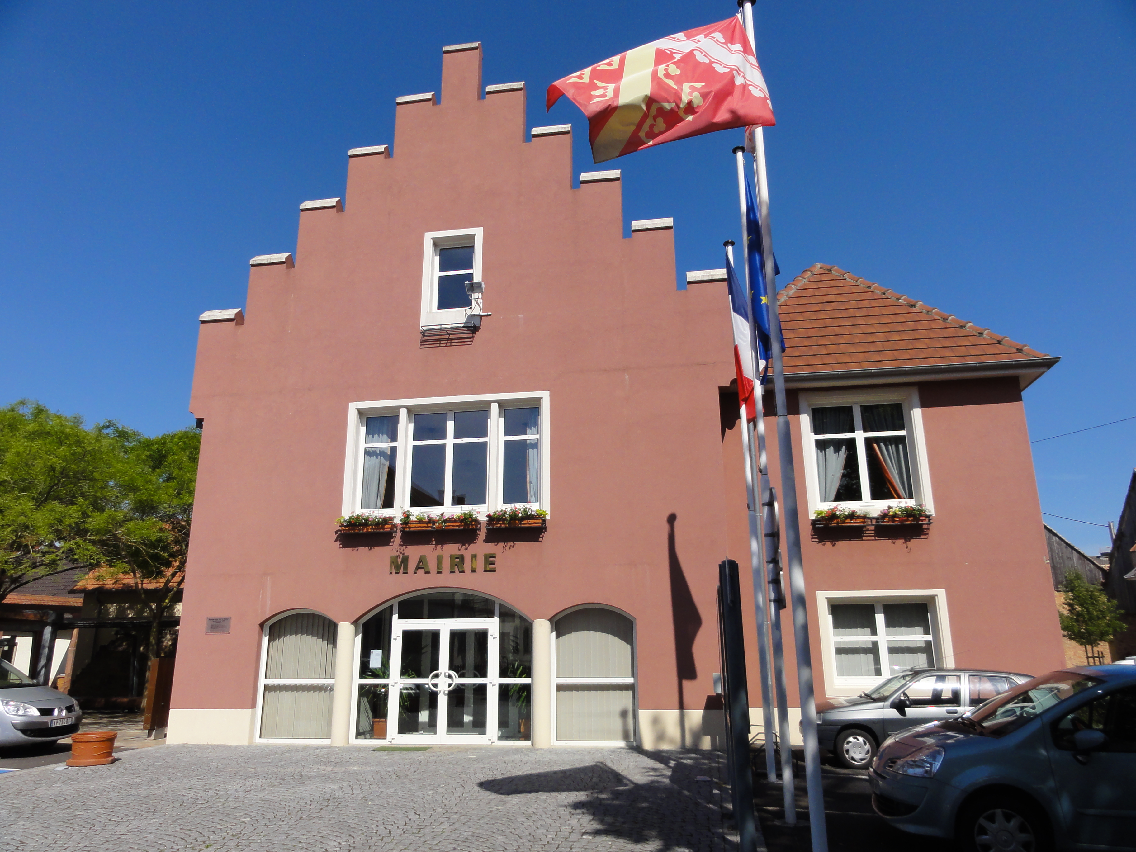 Alsace, Bas-Rhin, Griesheim-près-Molsheim, Mairie (1861-1877), place du Tilleul. .